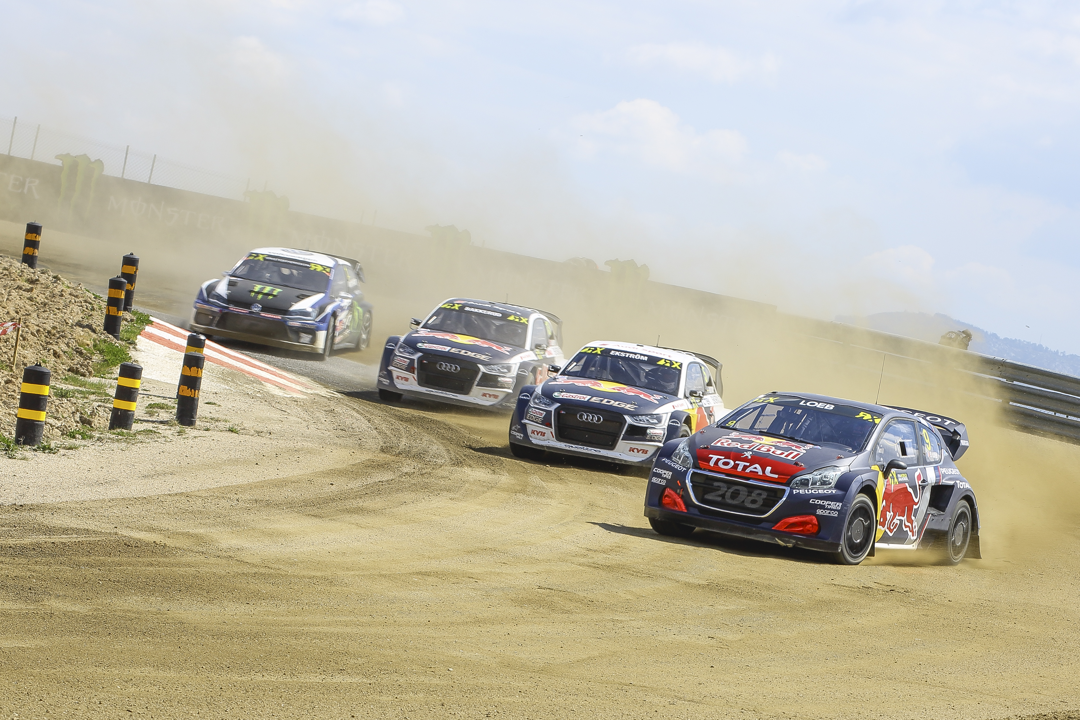 Johan Kristofferssonganó en la final en Portugal, tras hacerlo en España, el Sueco se afianza en el liderato provisional del Campeonato. Sin embargo no fue el mejor en las mangas de entrenamiento que fueron dominadas por Andreas Bakkerud.